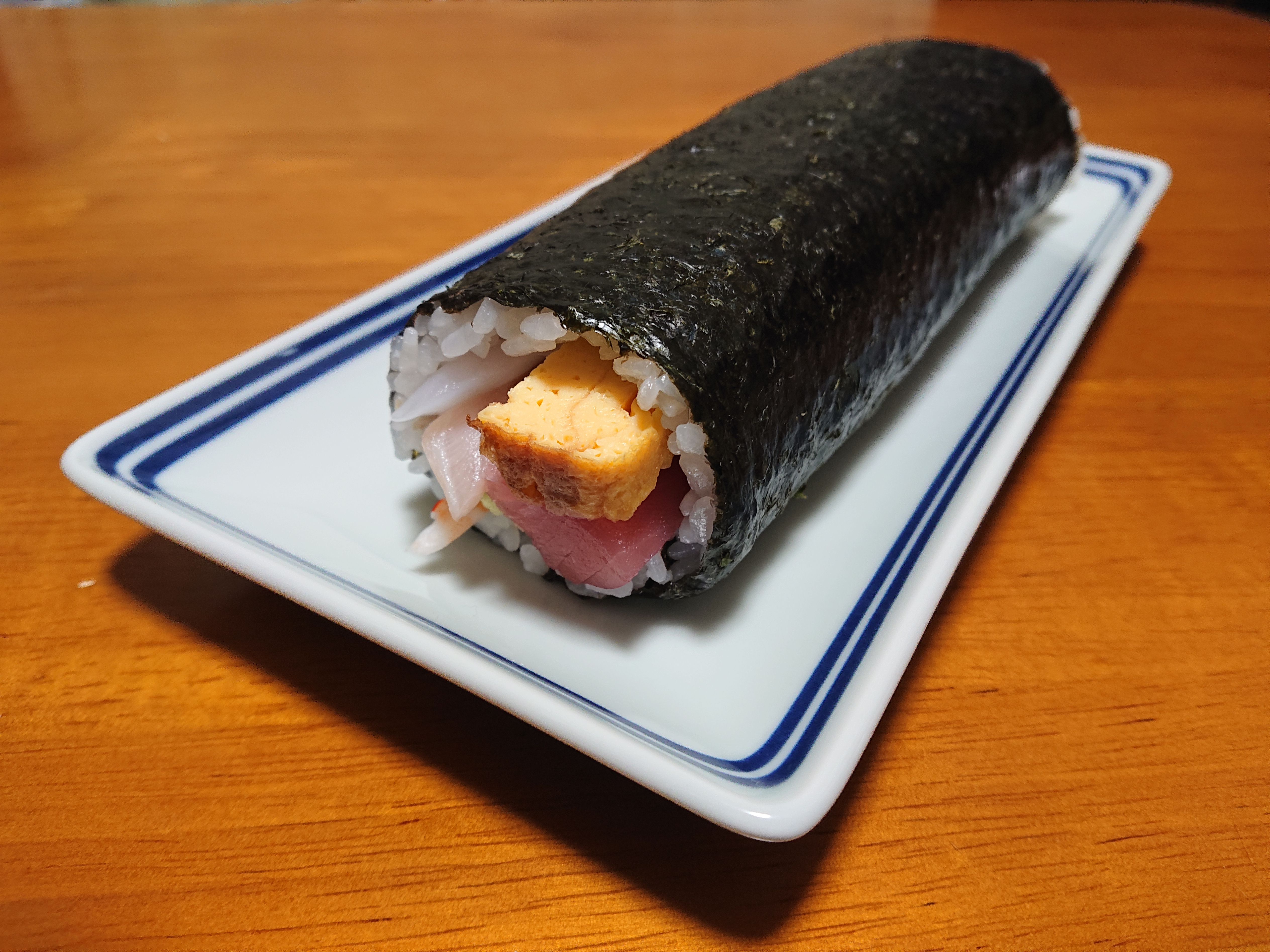 節分に食する太巻き寿司。